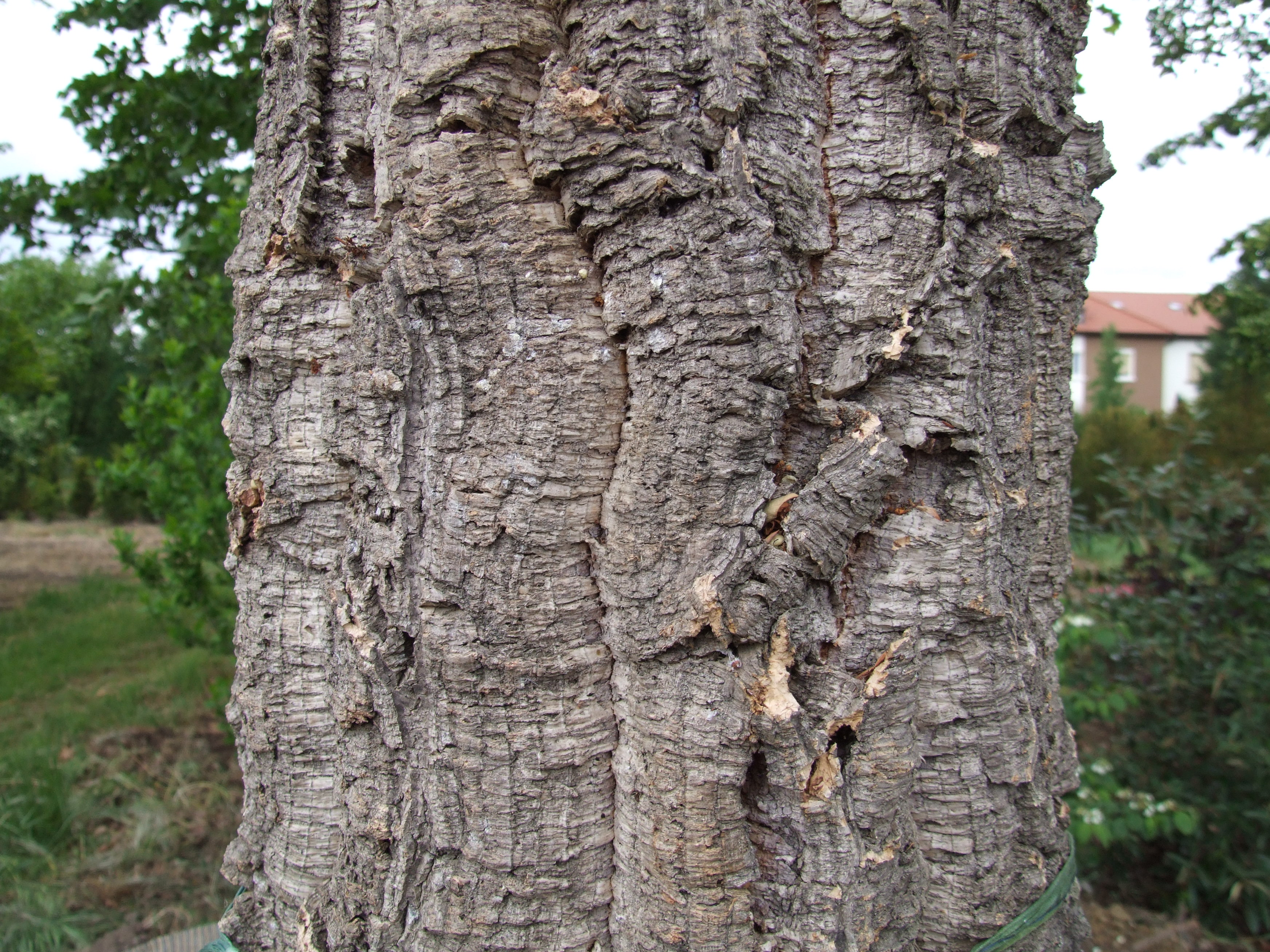 Stamm einer Korkeiche (Quercus suber)